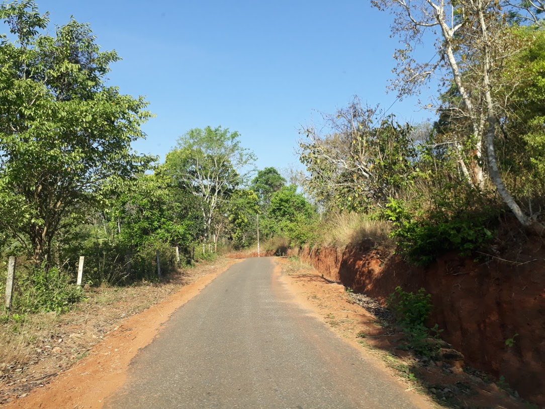 കുണ്ടുവമ്പാടം ചേര്ക്കുന്നത് ഭഗവതീക്ഷേത്രത്തിലേക്കുള്ള ഒരു നാട്ടുവഴി !